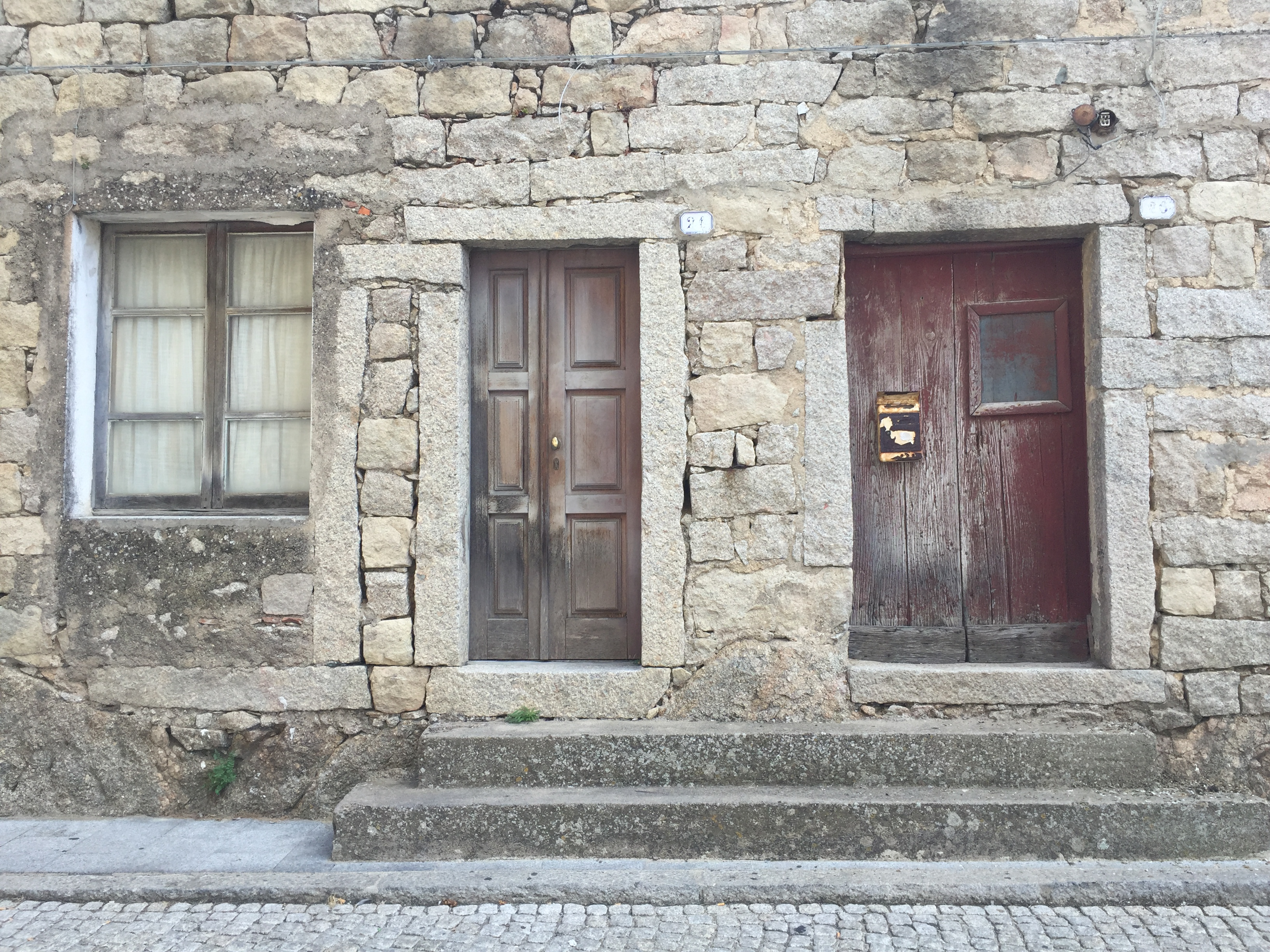 Fenêtres etc. à Calangianus.